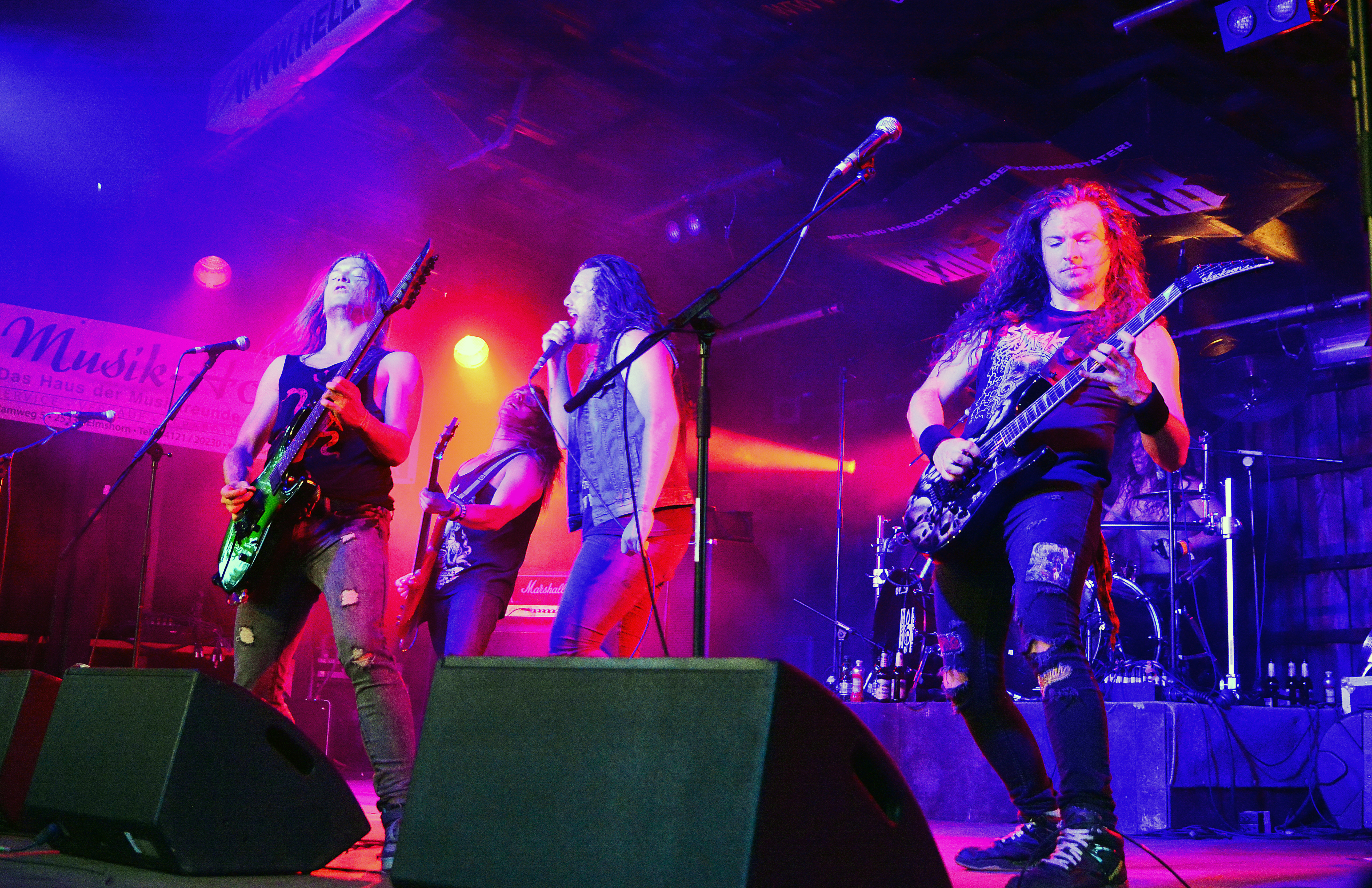 Striker beim Headbangers Open Air 2015